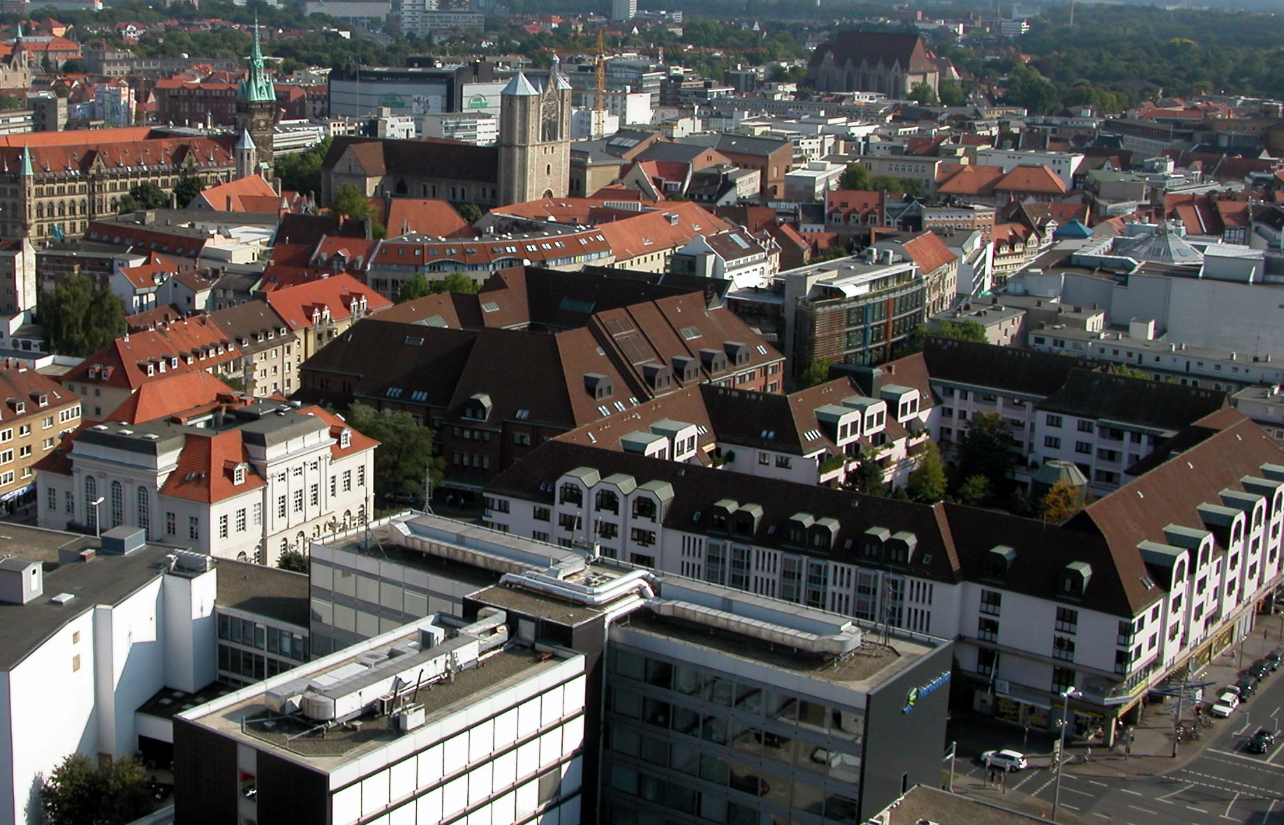 Braunschweig: Blick vom Südturm der Andreaskirche Richtung Südosten. Zu sehen sind im Vordergrund: Der Komplex „Welfenhof“ (ehemals Packhof), links das Neustadtrathaus, darüber hinaus die Buchhandlung Graff. Rechts unten die Kreuzung Meinhardshof / Küchenstraße. Im Hintergrund v.l.n.r.: Magnikirche, Neues Rathaus, Braunschweiger Dom und Aegidienkirche.